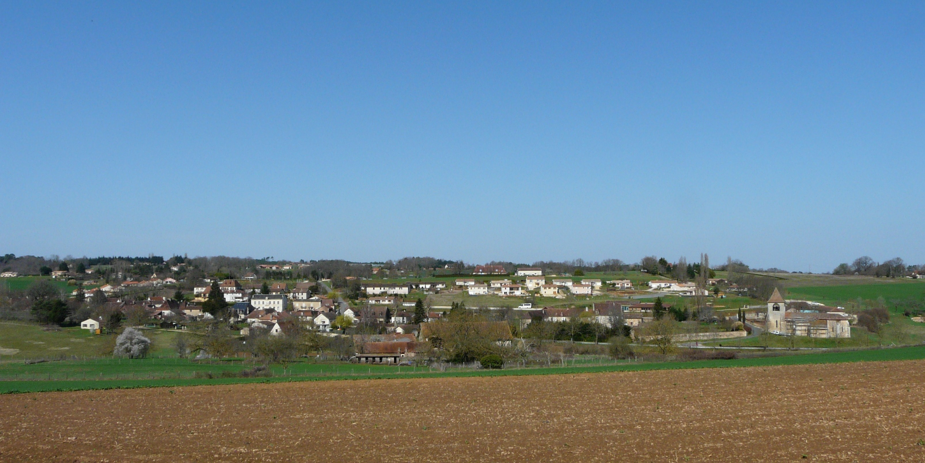 Le village de La Douze, Dordogne, France.